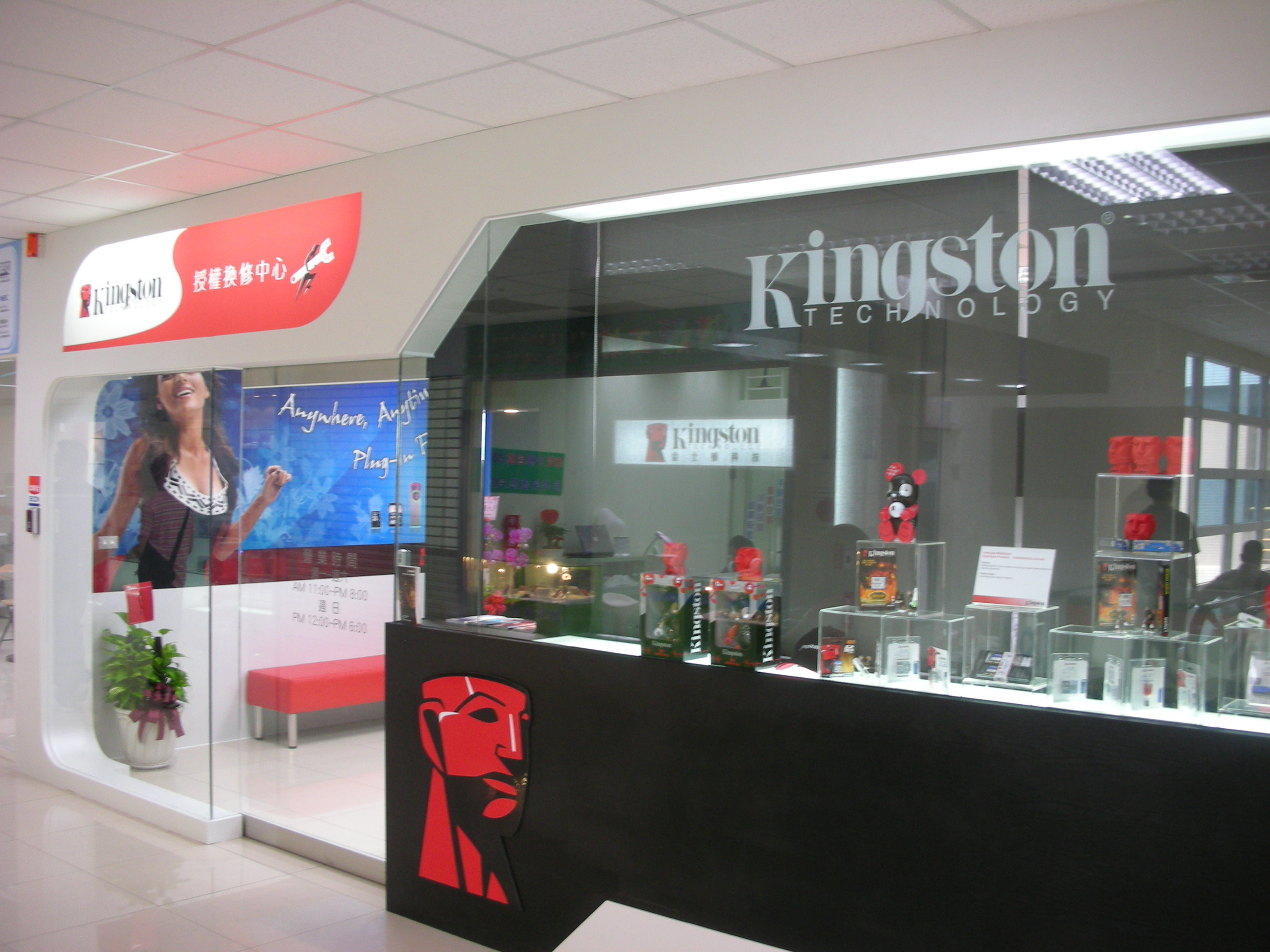 中文（台灣）: 光華數位新天地六樓4之1室，金士頓科技授權換修中心，甘霖科技營運。